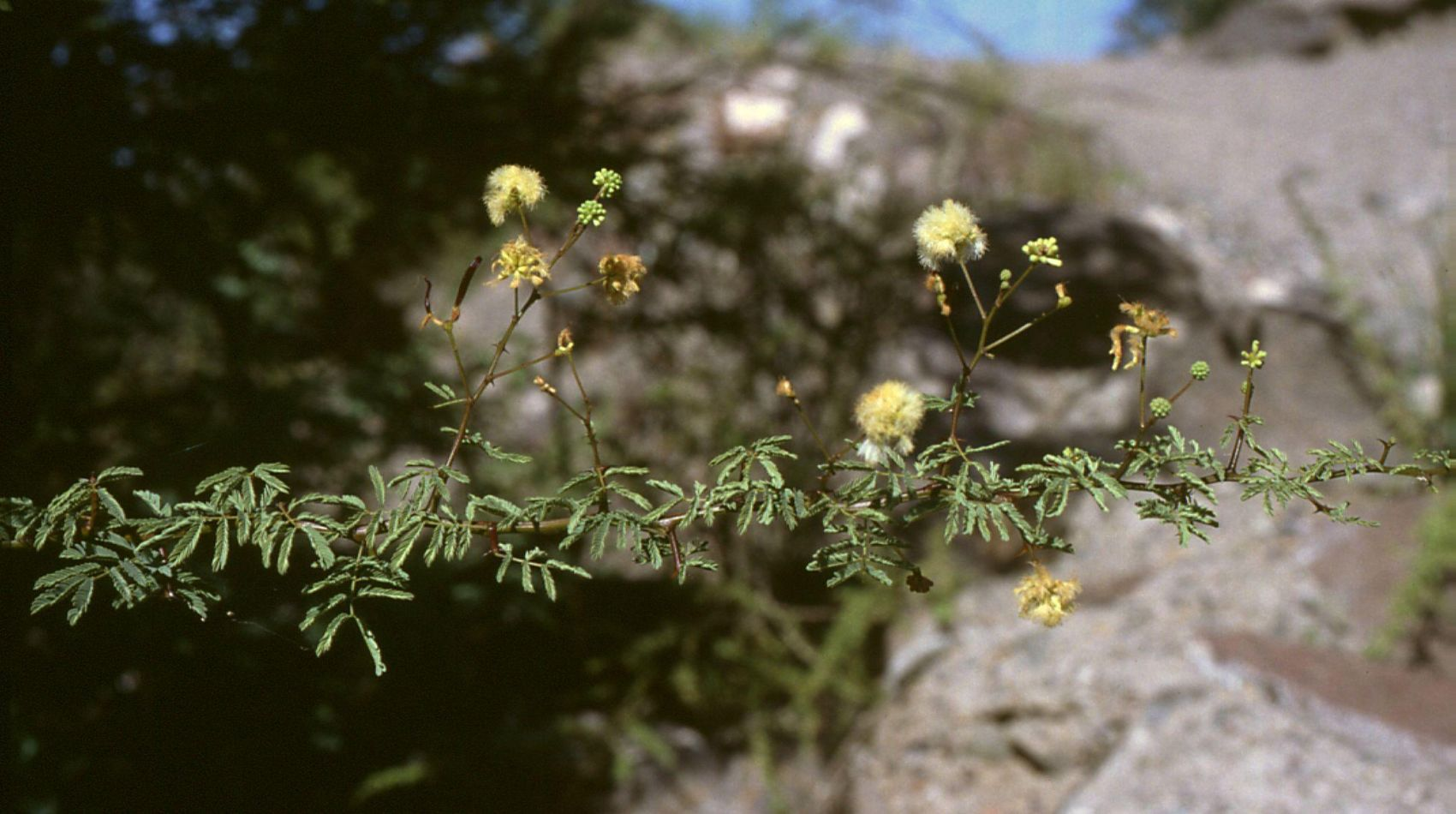 Senegalia gilliesii (= Acacia furcatispina), Hülsenfrüchtler (Fabaceae), Mimosengewächse (Mimosoideae) - Argentinien/Argentina, Mendoza, Cerro de la Gloria (Prov. Mendoza)